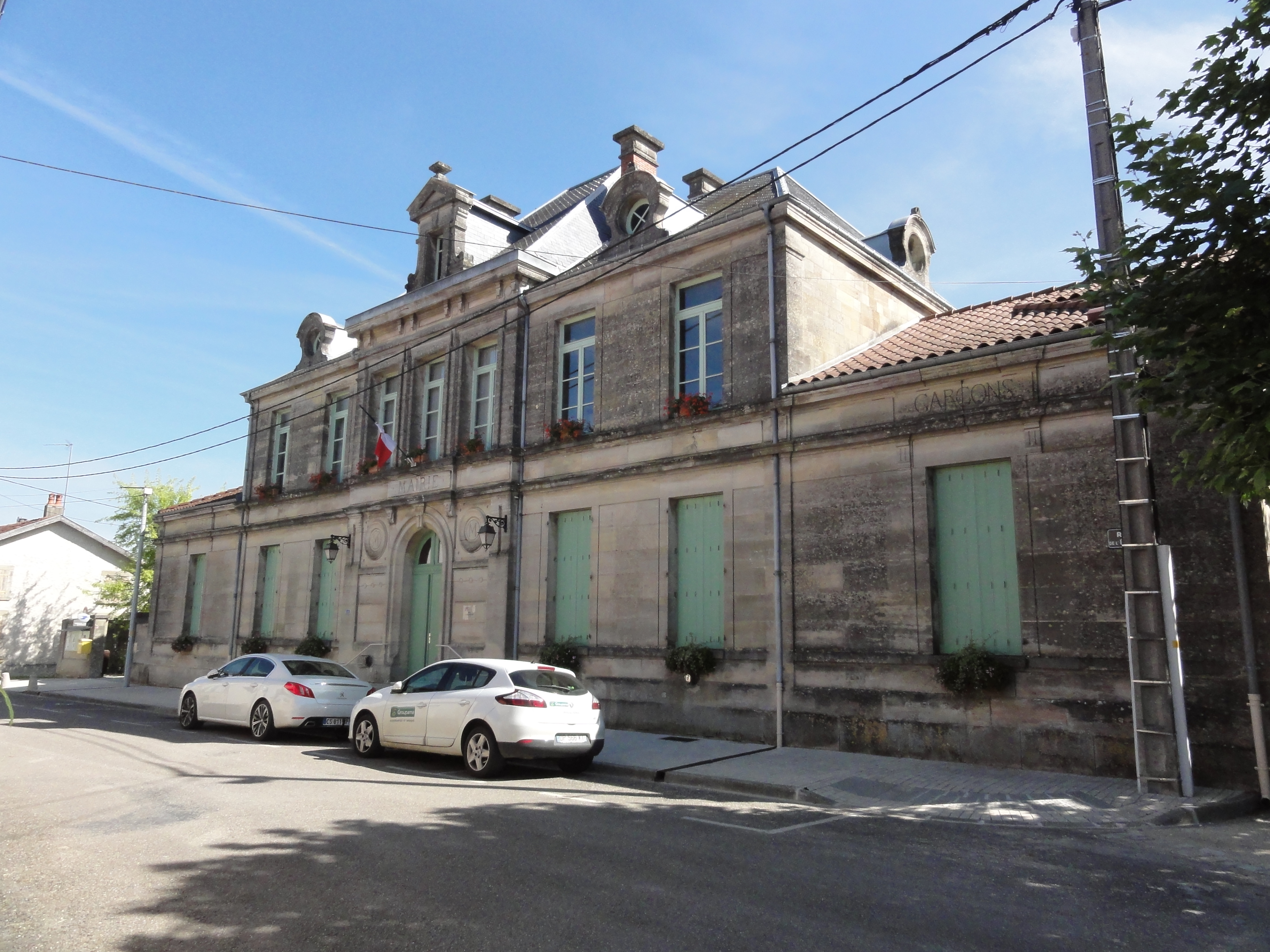 Mognéville (Meuse) mairie